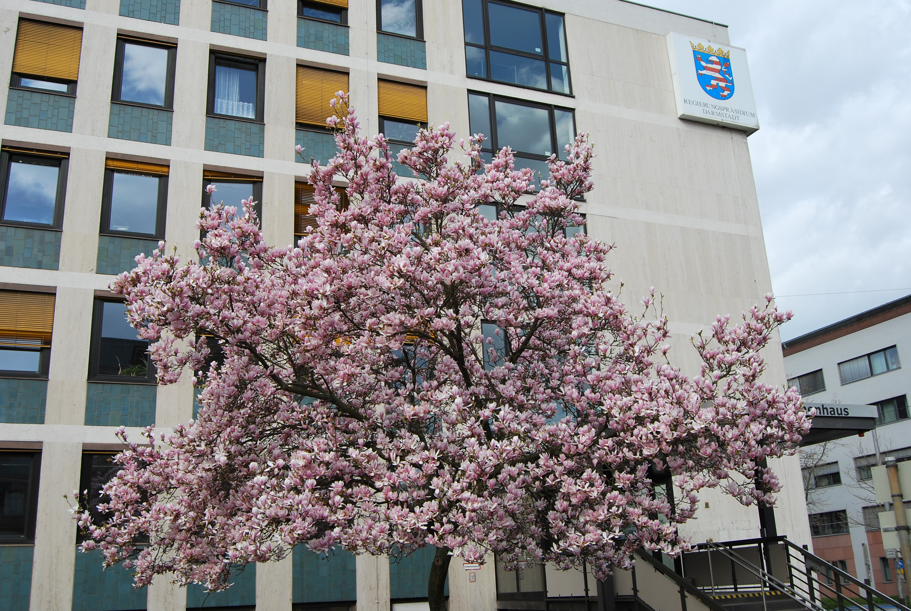 Blick auf den Eingang zum Wilhelminenhaus des Regierungspräsidiums Darmstadt in der Wilhelminenstraße 1-3